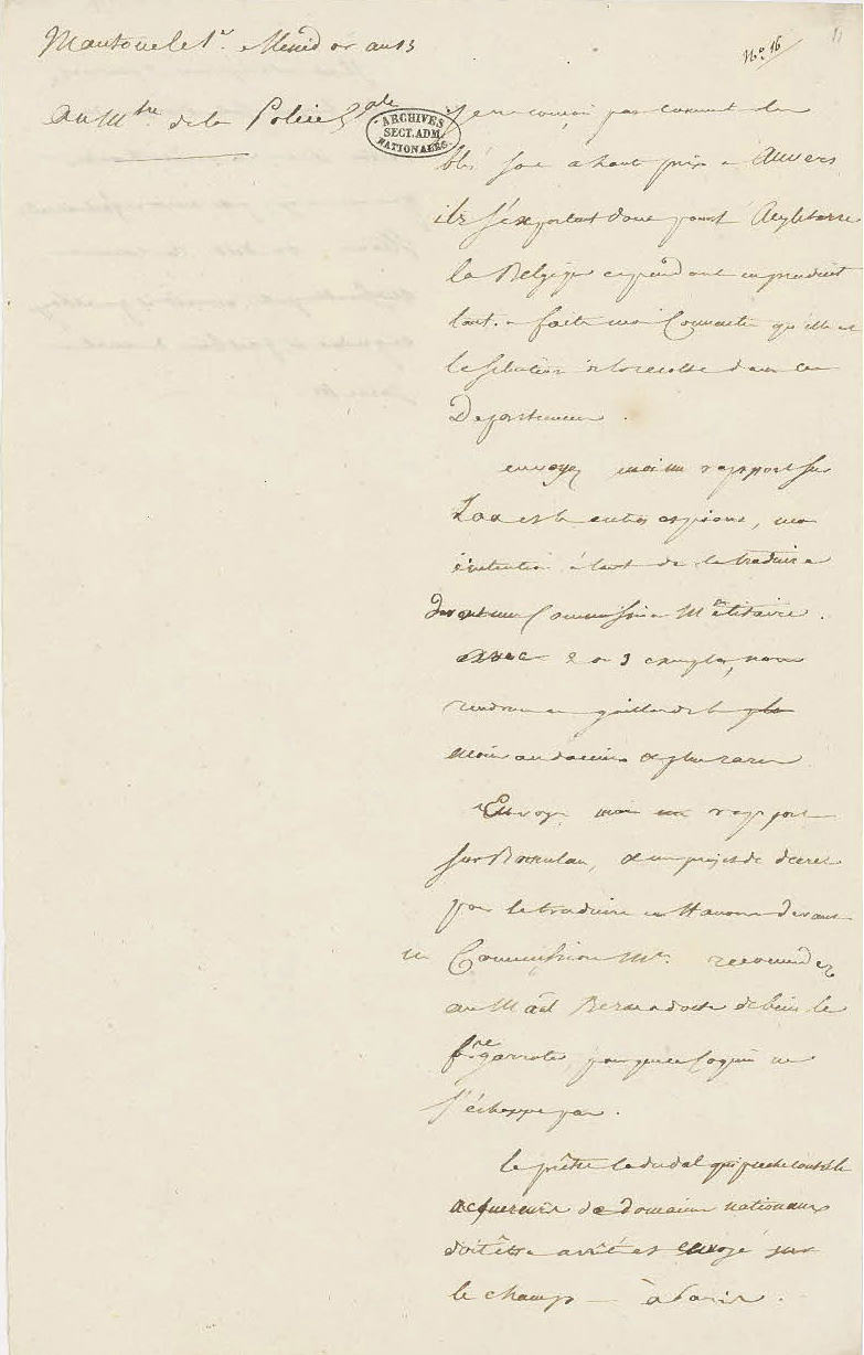 Minute d’une lettre de Napoléon Ier à Joseph Fouché, ministre de la Police générale (1799–1802, 1804–1810), lui enjoignant de rédiger un rapport contre l’espion André Làa et ses complices, Mantoue